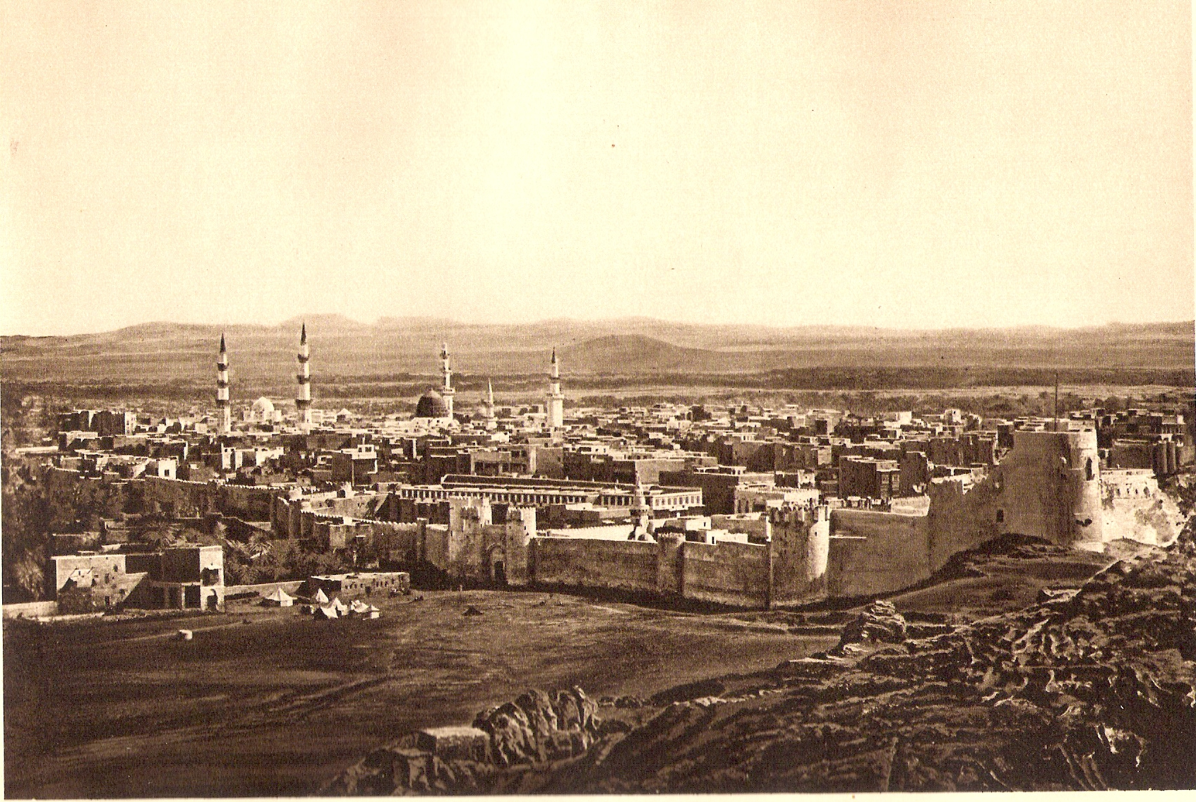 העיר מדינה בערב הסעודית